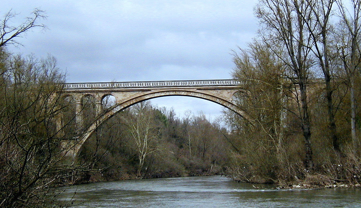 Lavaur - Viaduc ferroviaire Séjourné sur l'Agout